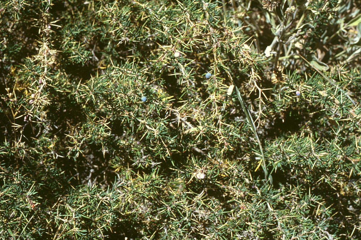 Berberis empetrifolia, Berberitzengewächse (Berberidaceae) - Argentinien/Argentina, Paso de Uspallata, Puente del Inca, ca. 2700 m s.m. (Prov. Mendoza)